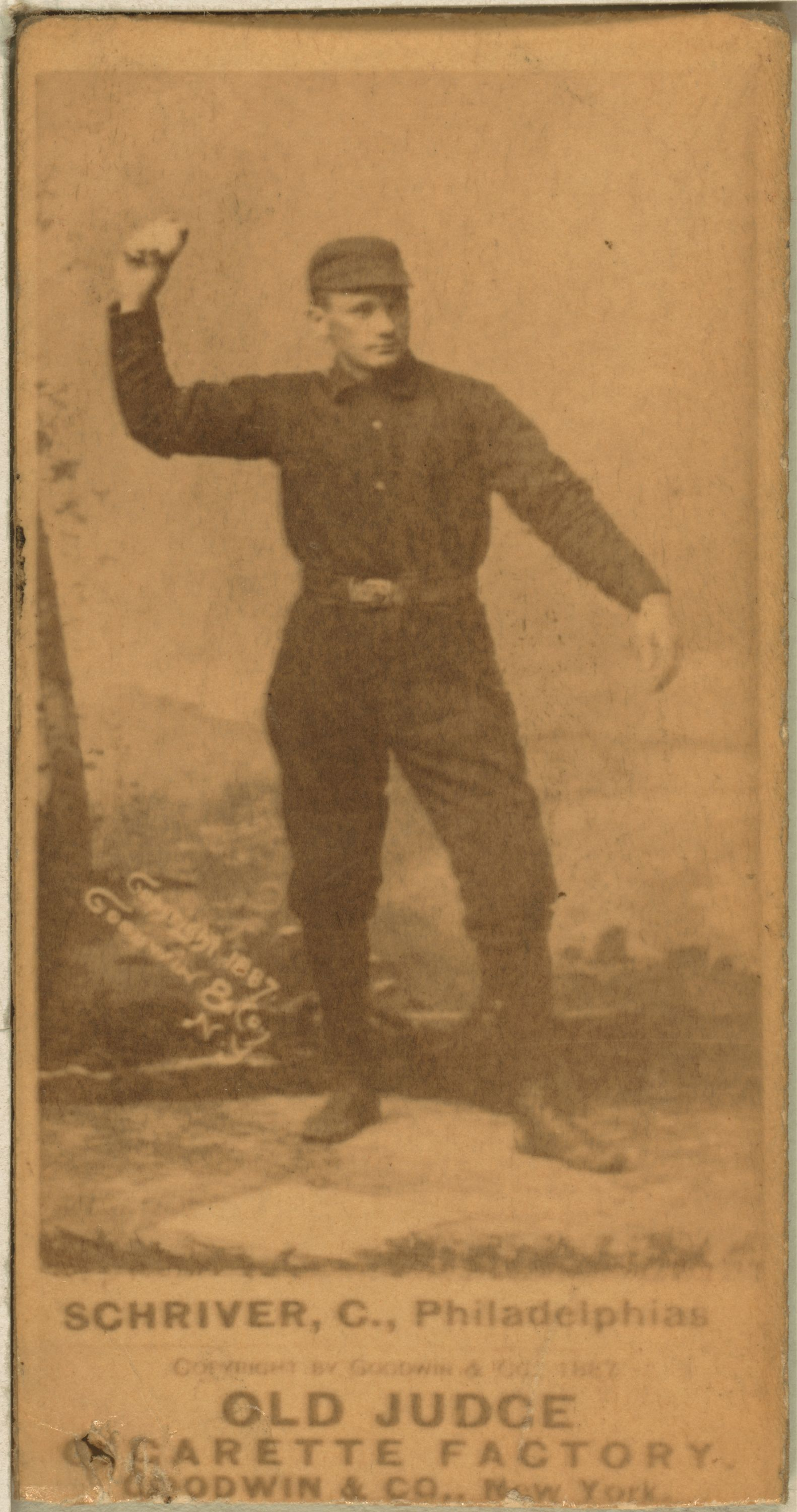 Pop Schriver